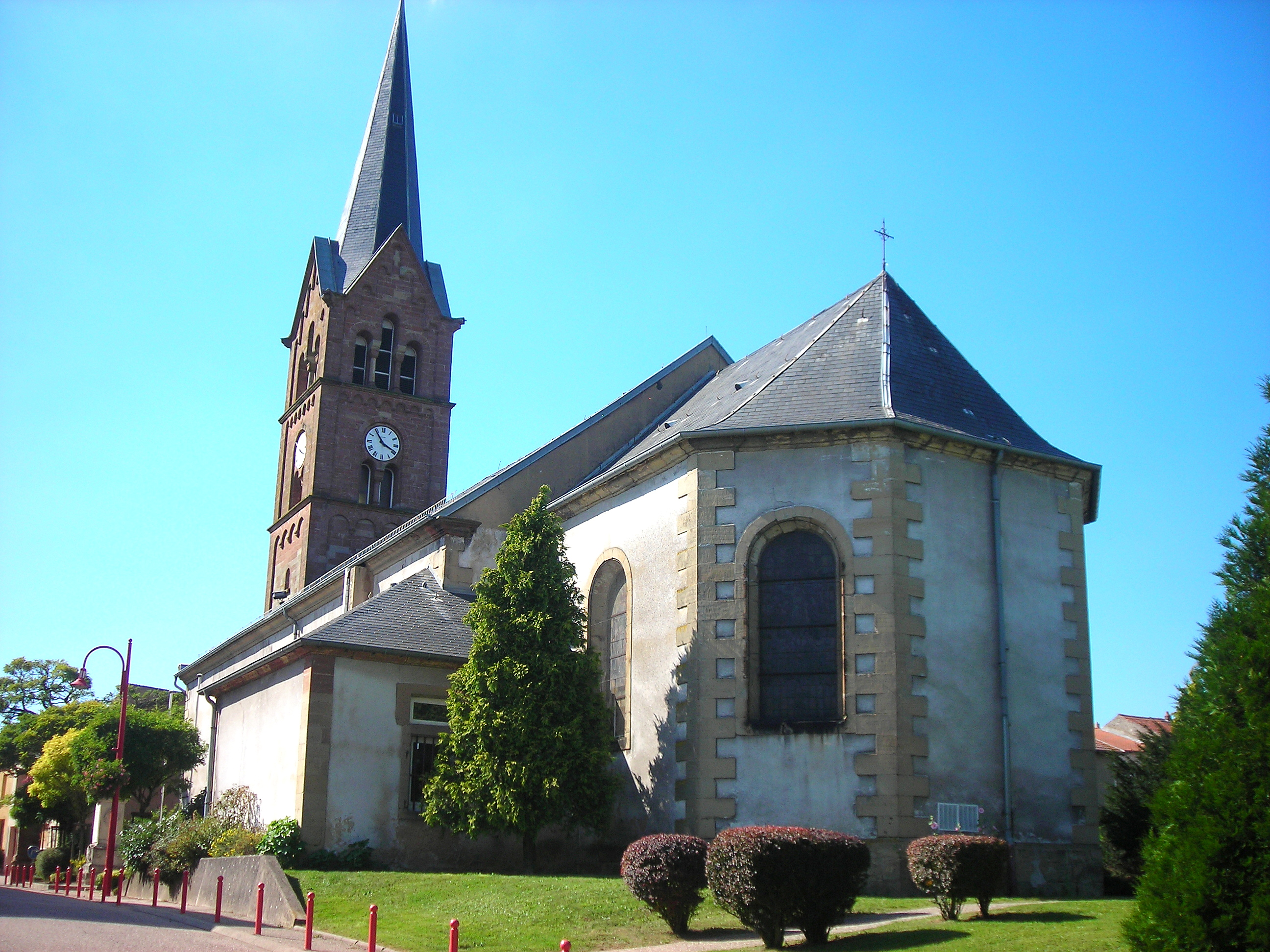 Chevet de l'église de Boucheporn (Moselle, France)